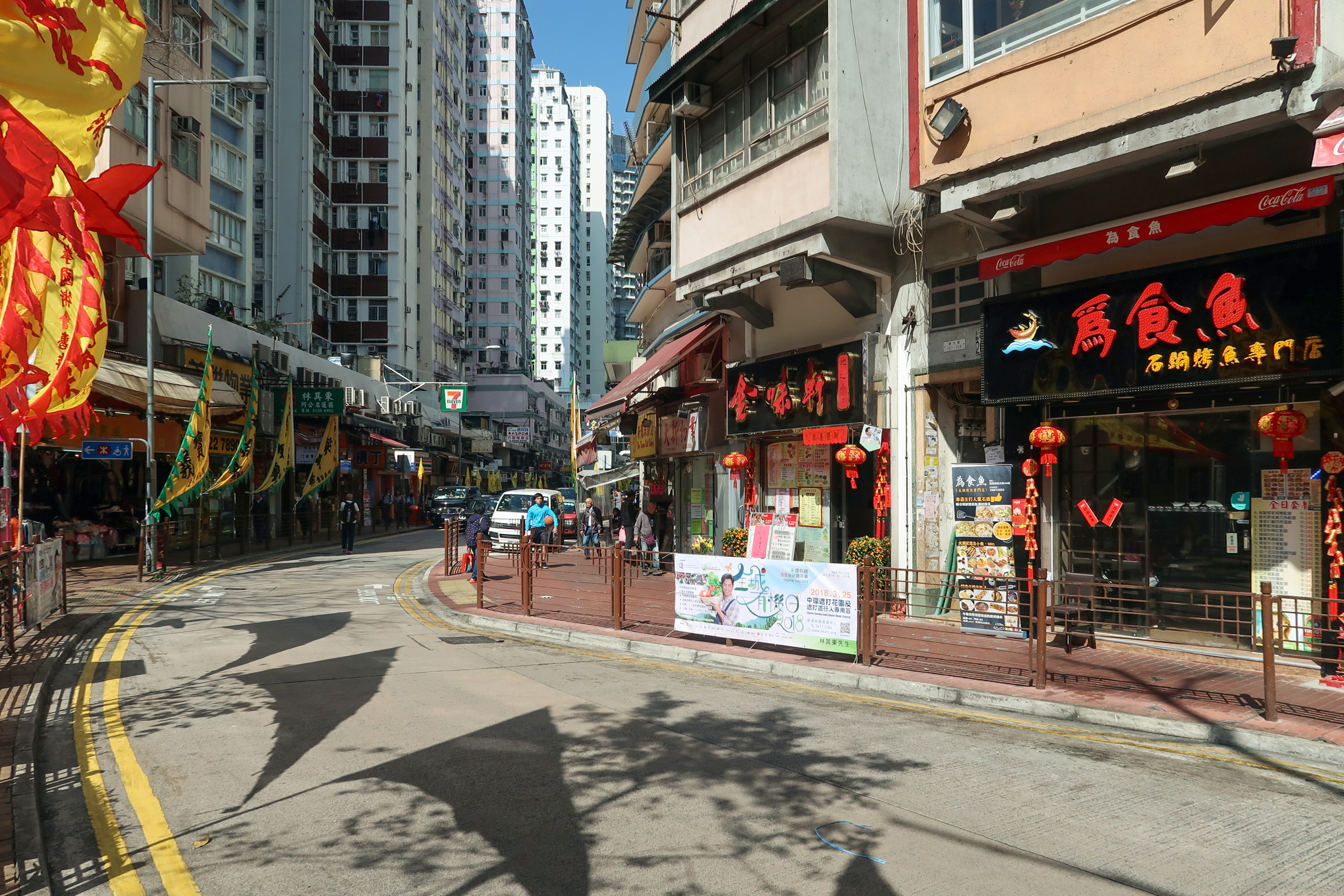 Shau Kei Wan Main Street East Tram Terminus